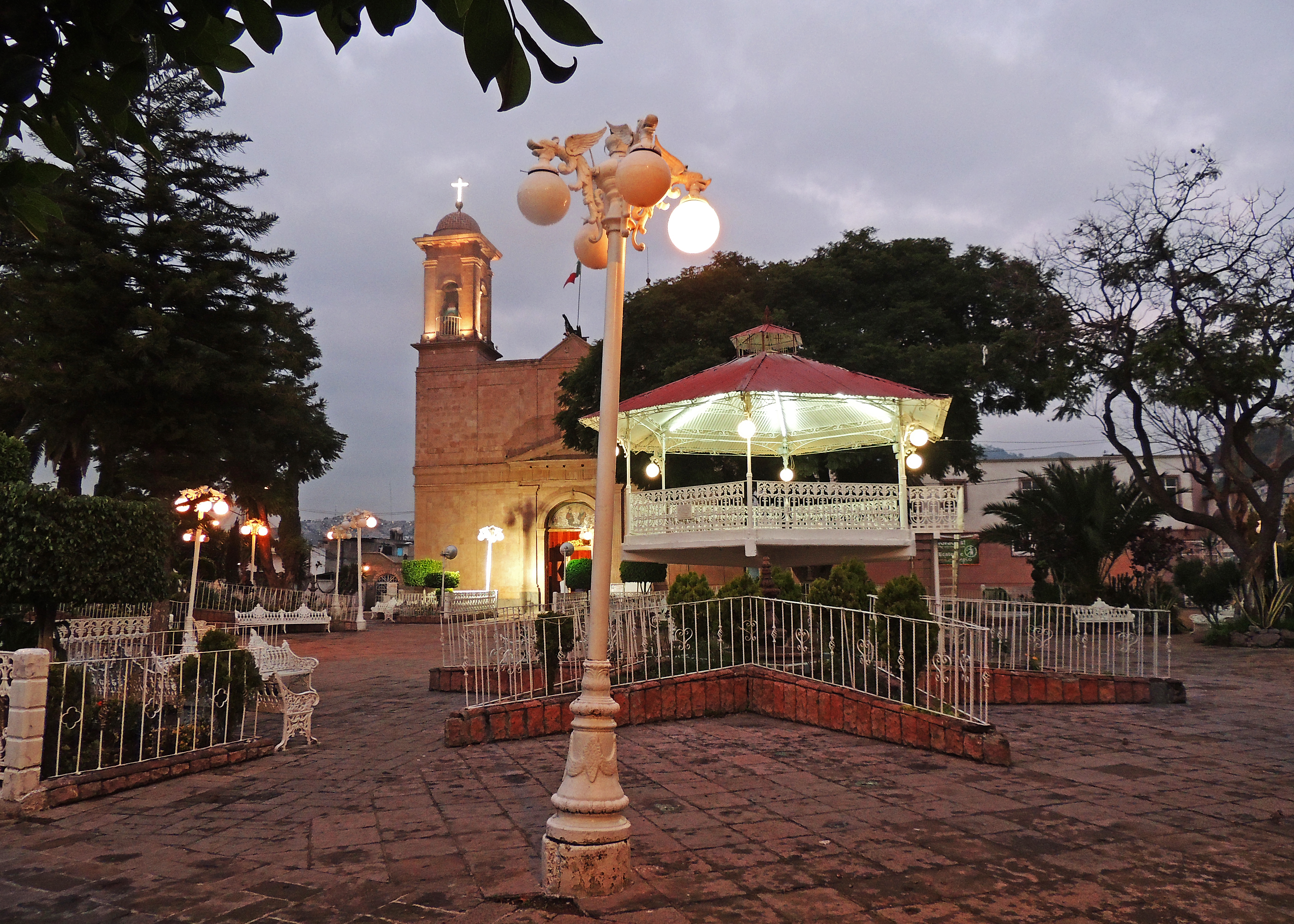 Capilla San Pedro